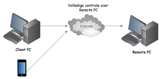 Deze afbeelding geeft de verhouding weer tussen de Client PC en de Remote PC.